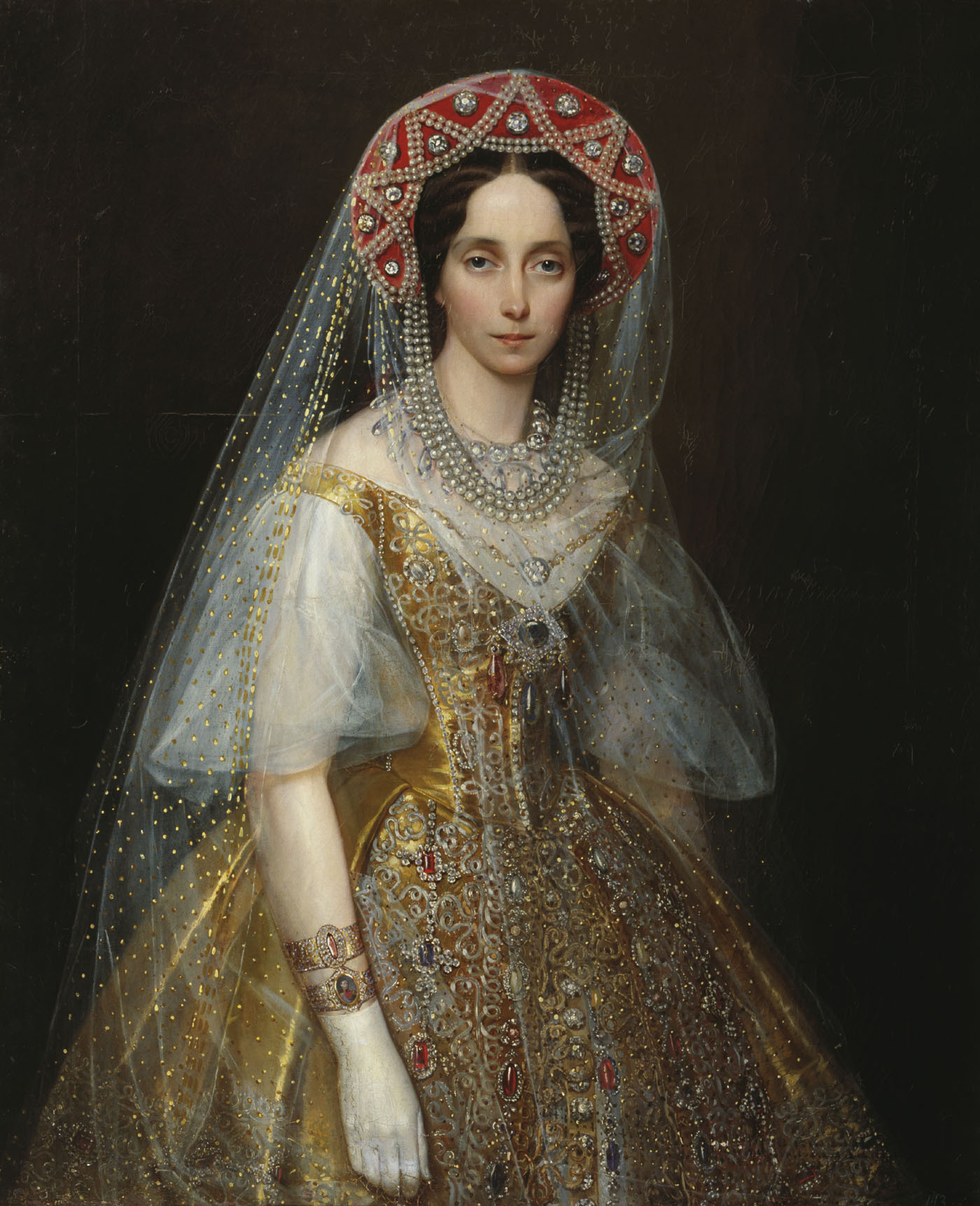 Die junge Zarin Maria Alexandrowna in russischer Tracht. State Art Museum of the Dagestan Republic, Makhatchkala